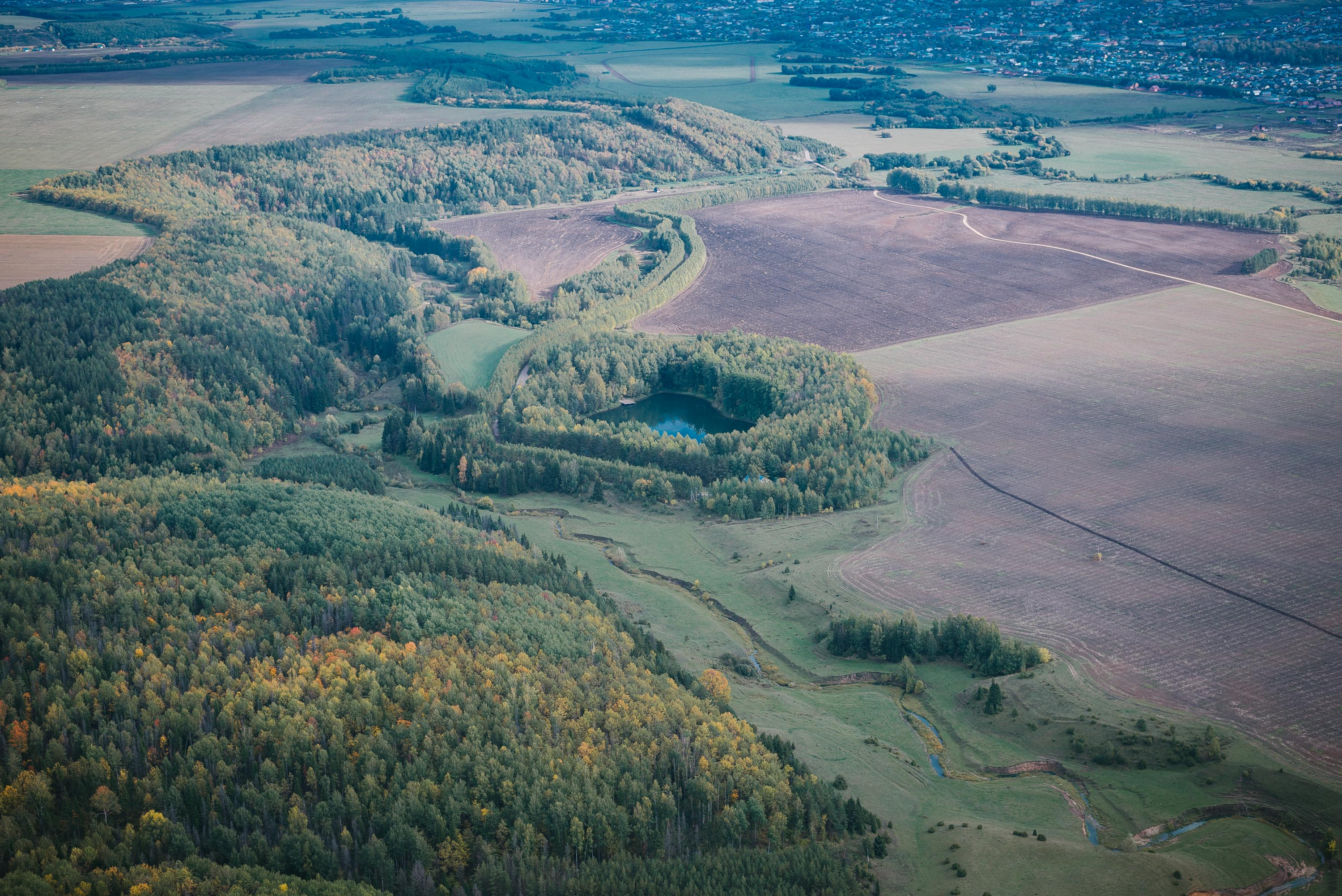 Озеро Кара-Куль (Черное): Балтасинский район РТ, в 2 км юго-восточнее д. Ярак-Чурма,д. Ярак-Чурма,Балтасинский район, Татарстан This image is related to the protected area of Russia number 1610043